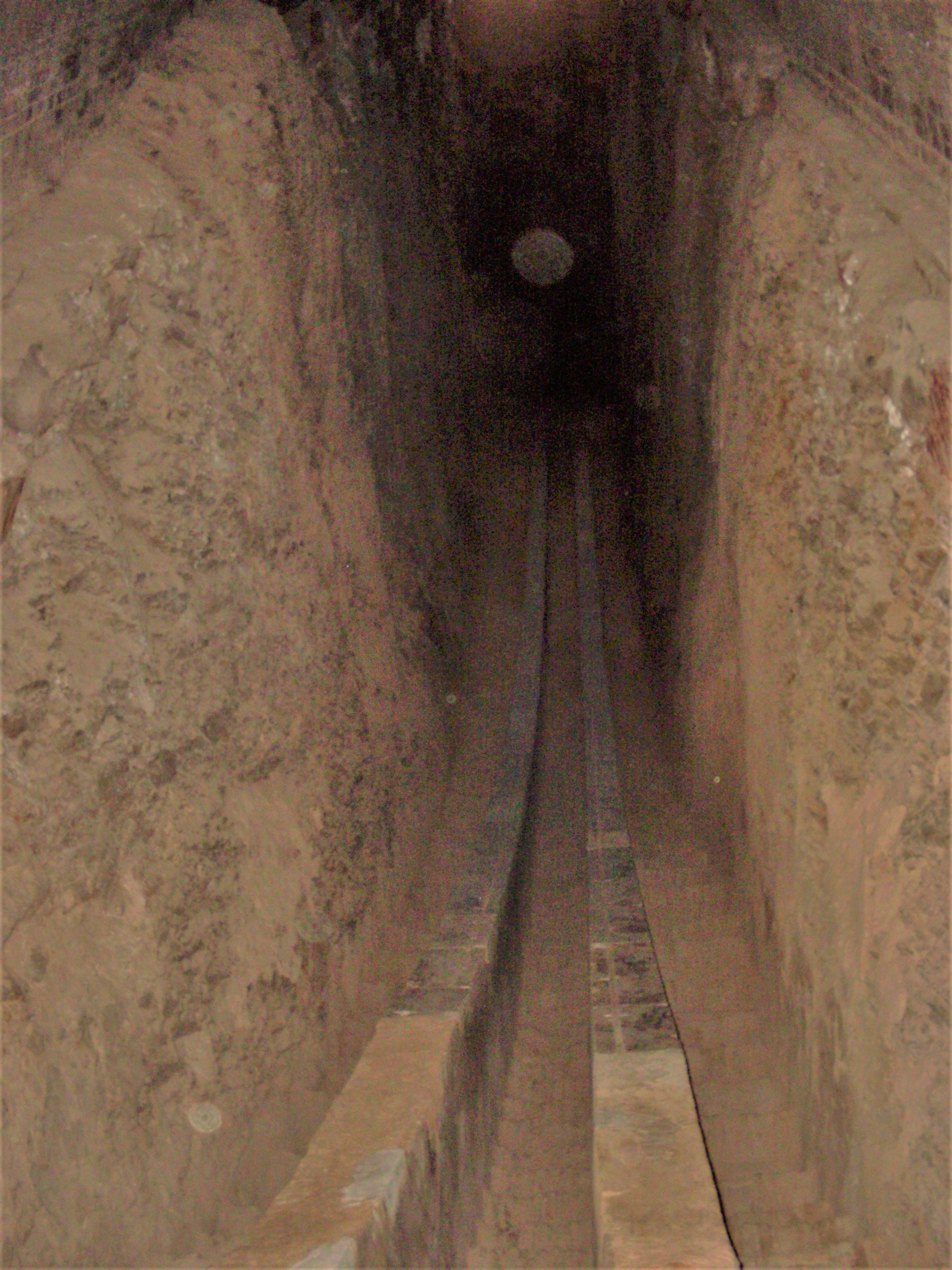 Observatie Ulugbek sextant Обсерватория Улугбека секстант